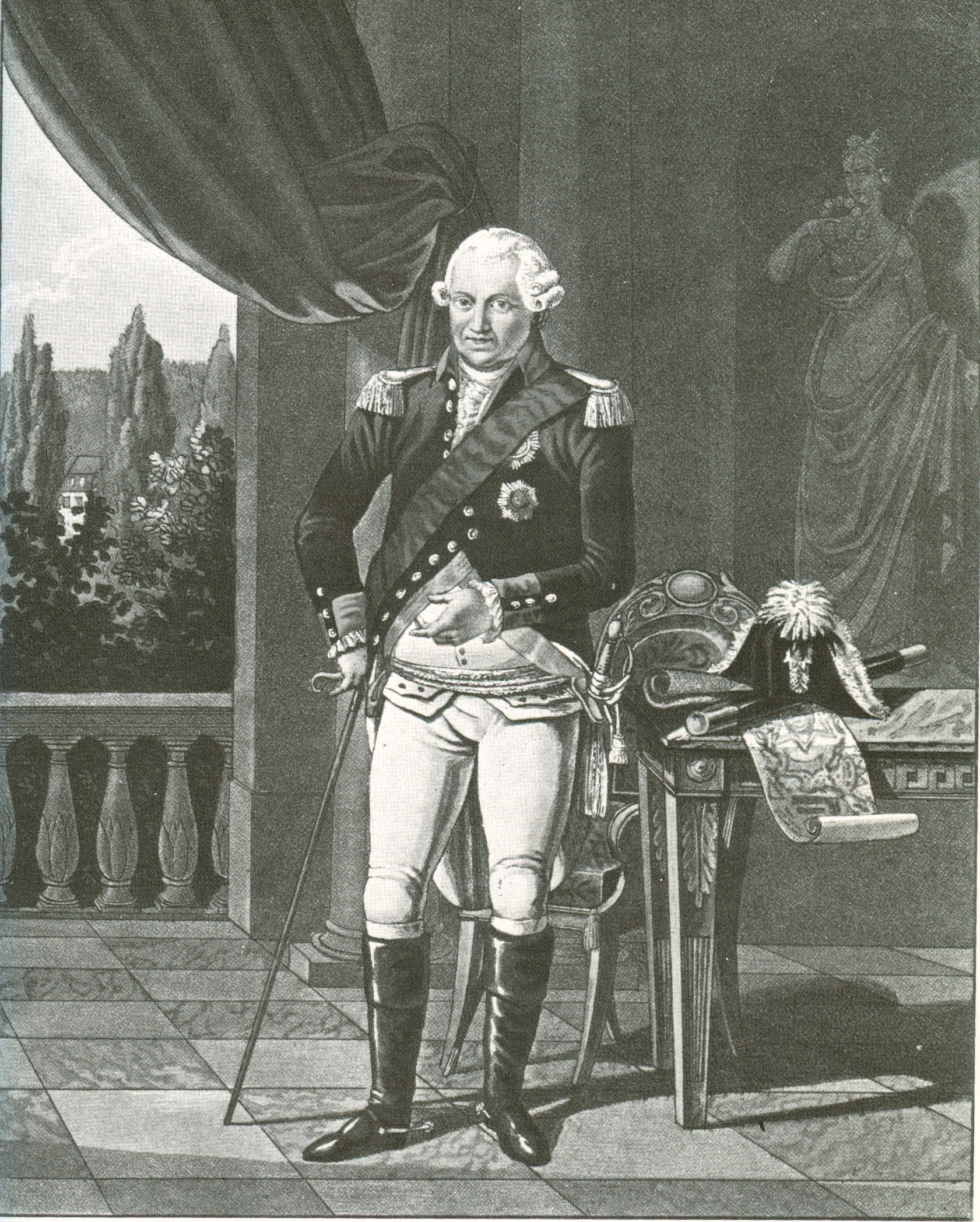 Herzog Friedrich Eugen (1795 - 1797) Aquatina Radierung, koloriert unbekannter Meister 1821 Württembergische Landesbibliothek, Stuttgart